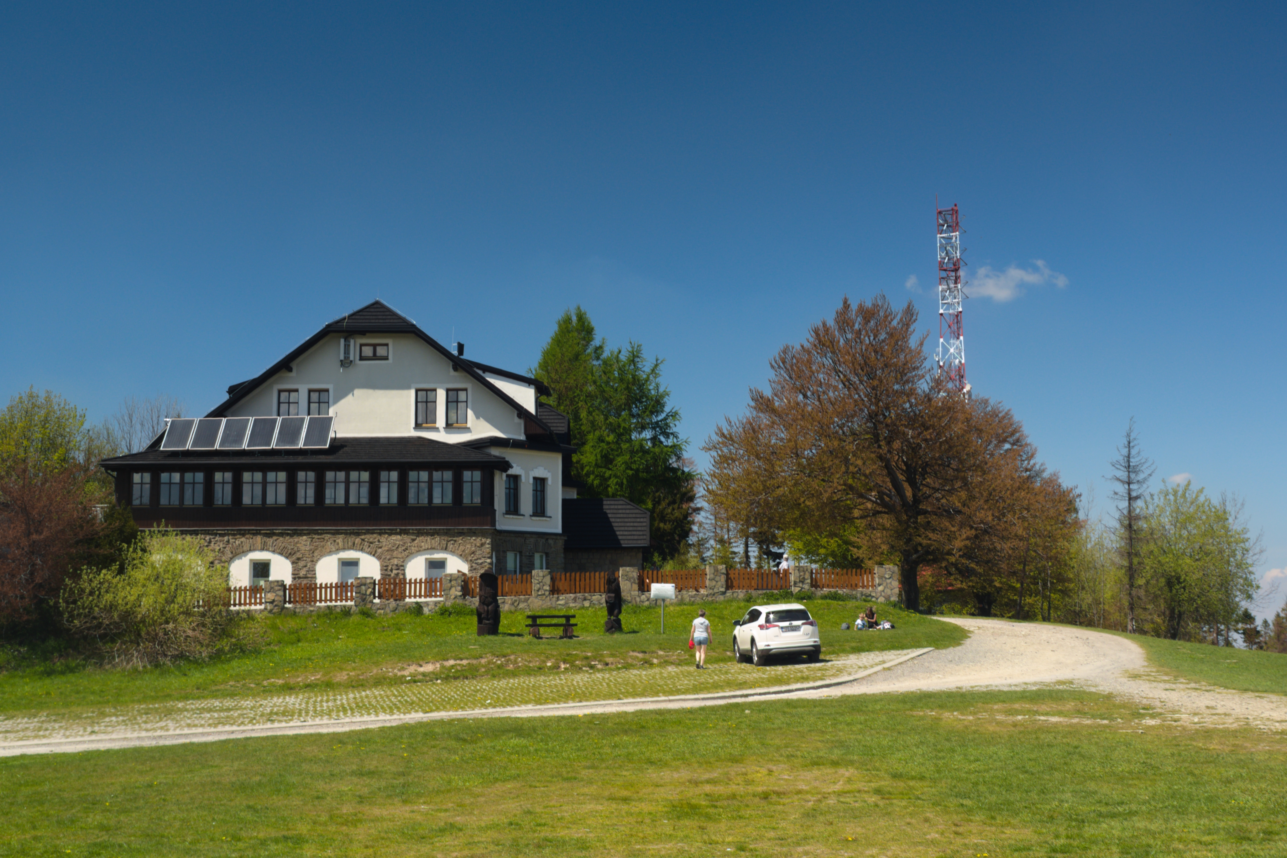 schronisko PTTK na Magurce Wilkowickiej, Magurka Wilkowicka 7, Wilkowice